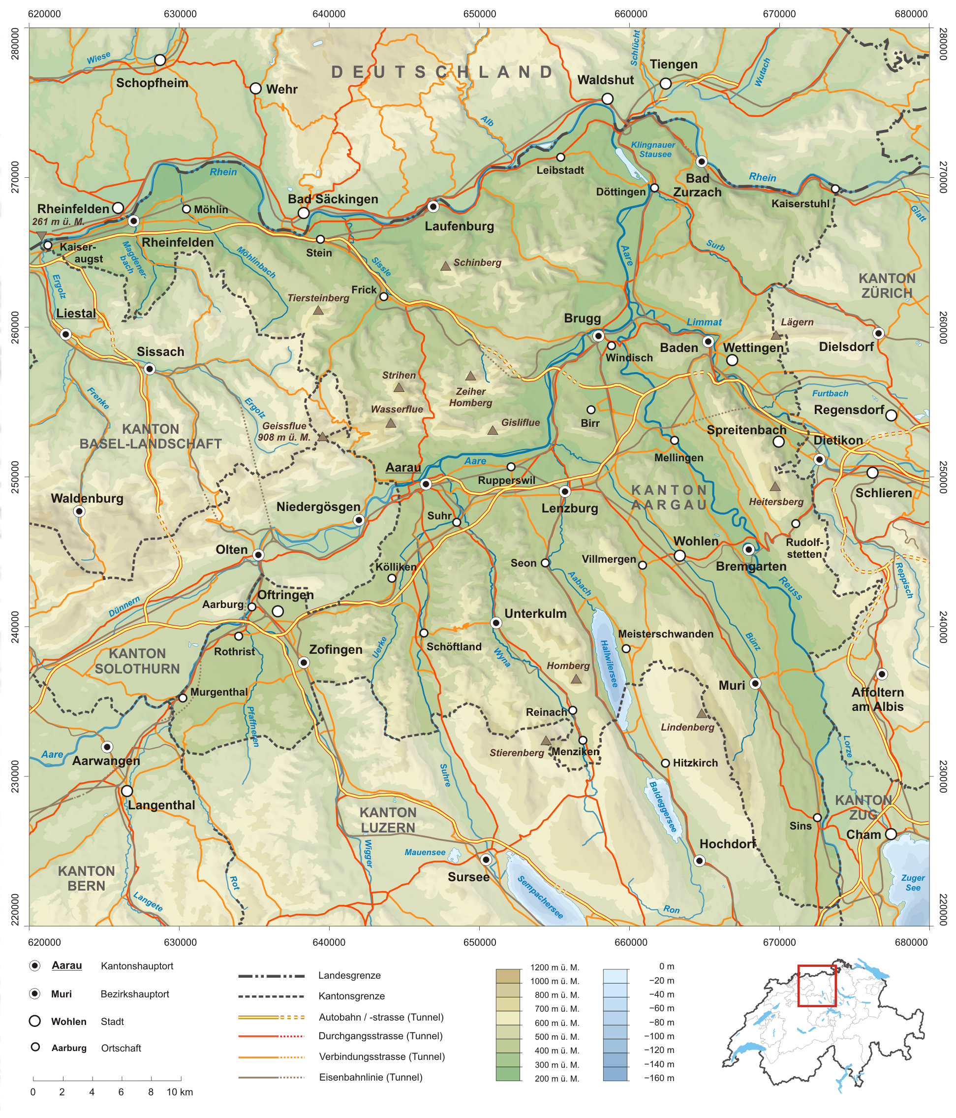 Karte des Kanton Aargau. Topographischer Hintergrund: NASA Shuttle Radar Topography Mission (public domain). SRTM3 v.2.